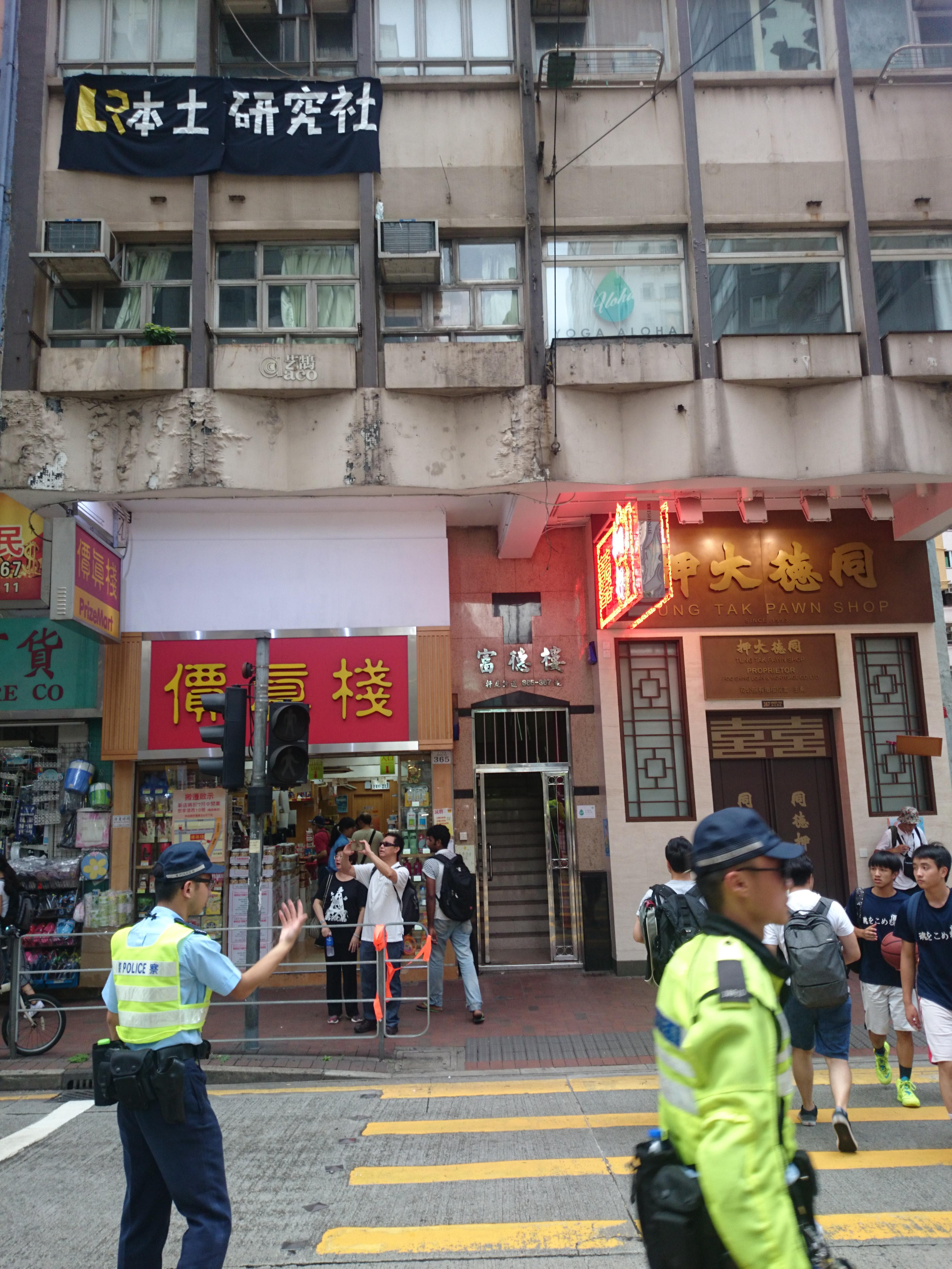 中文（香港）: 本土研究社辦公室外牆（左上）